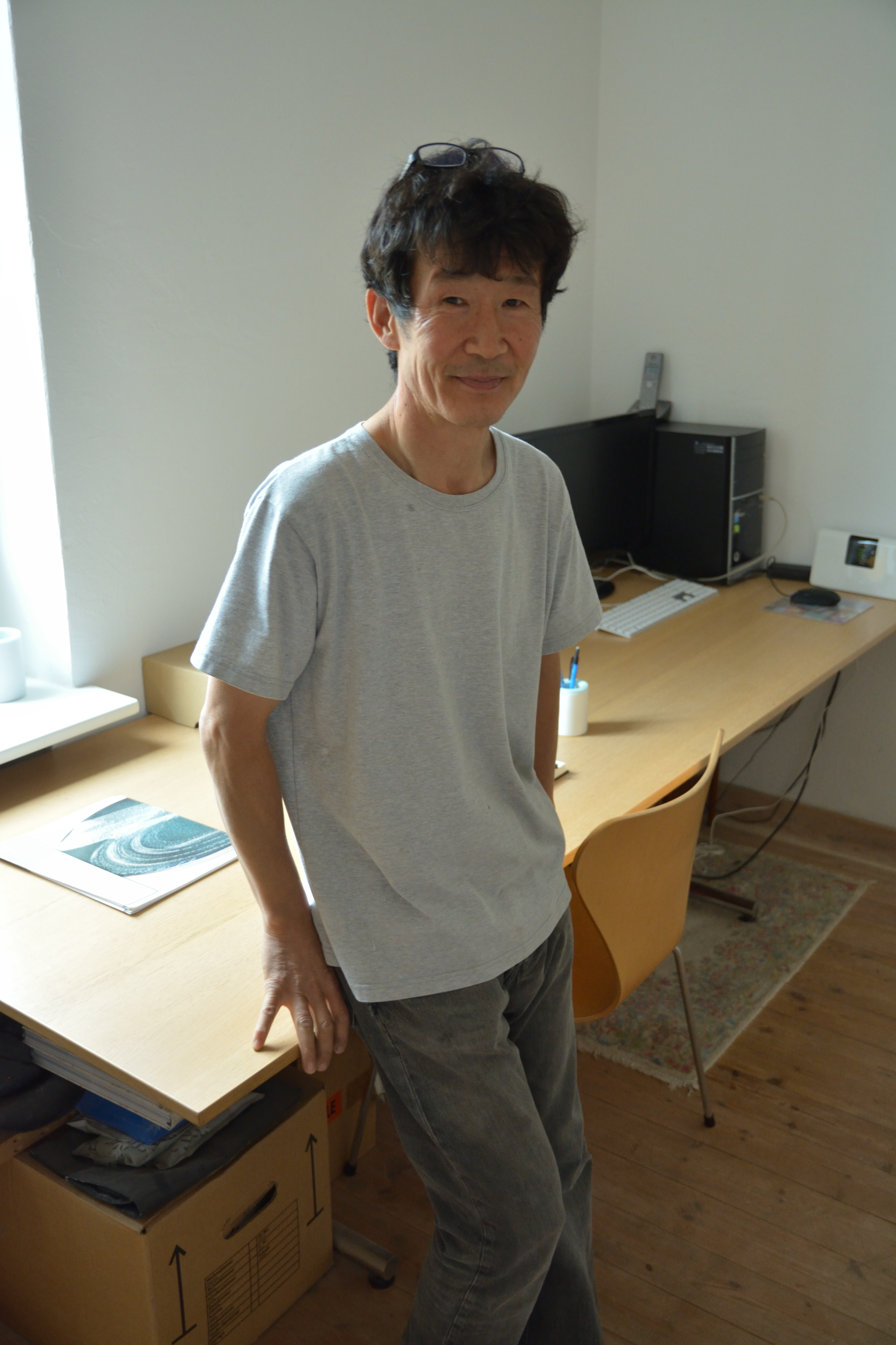 Impressionen vom Töpfermarkt 2018 in Kellinghusen,Hier: Tag der offenen Tür in der Werkstatt von Hwang Kap-Sun.